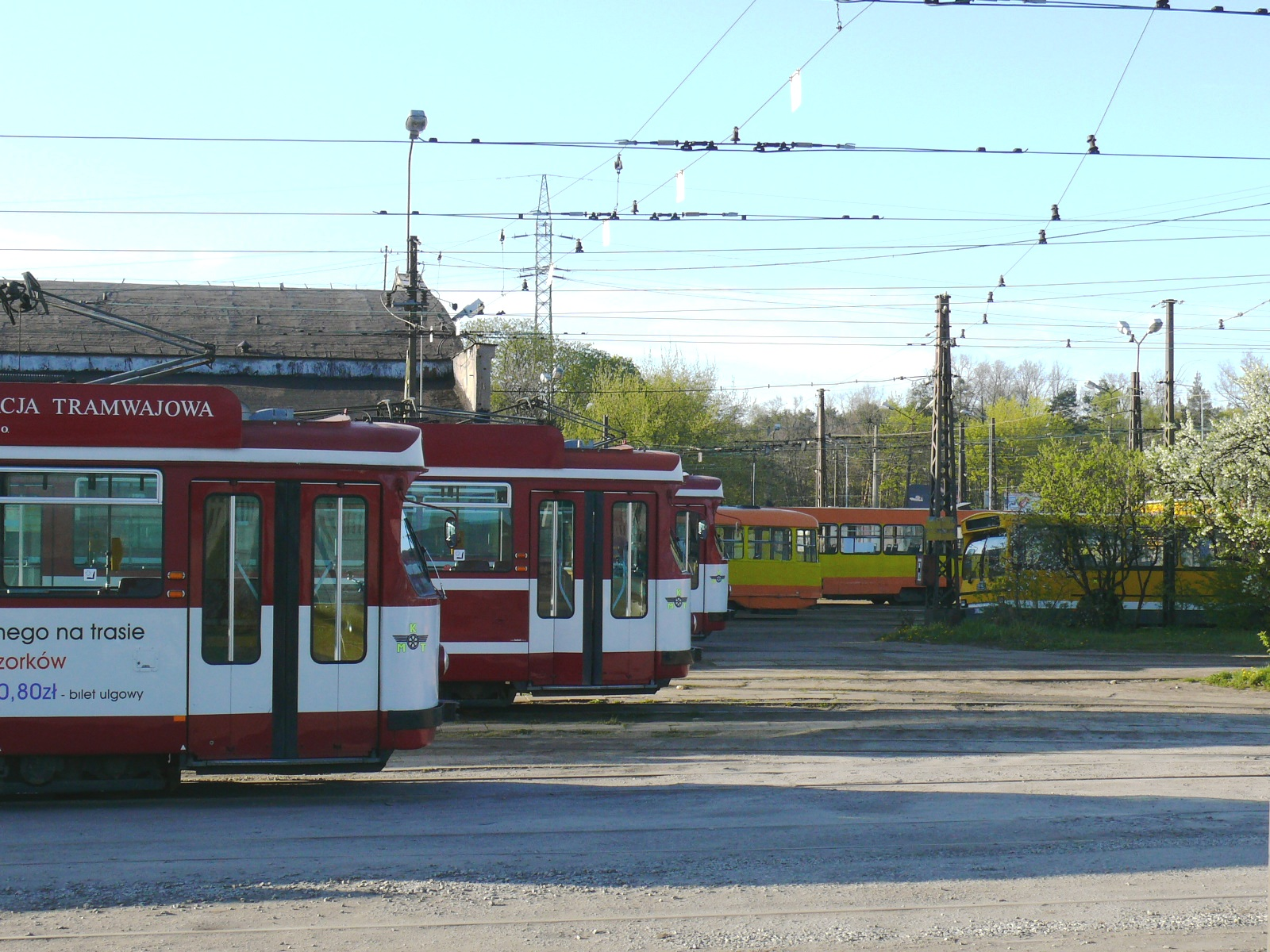 Tramwaj jednokierunkowy DÜWAG GT8 wyprodukowany dla Fryburga Bryzgowijskiego w zajezdni tramwajowej Helenówek w Łodzi.